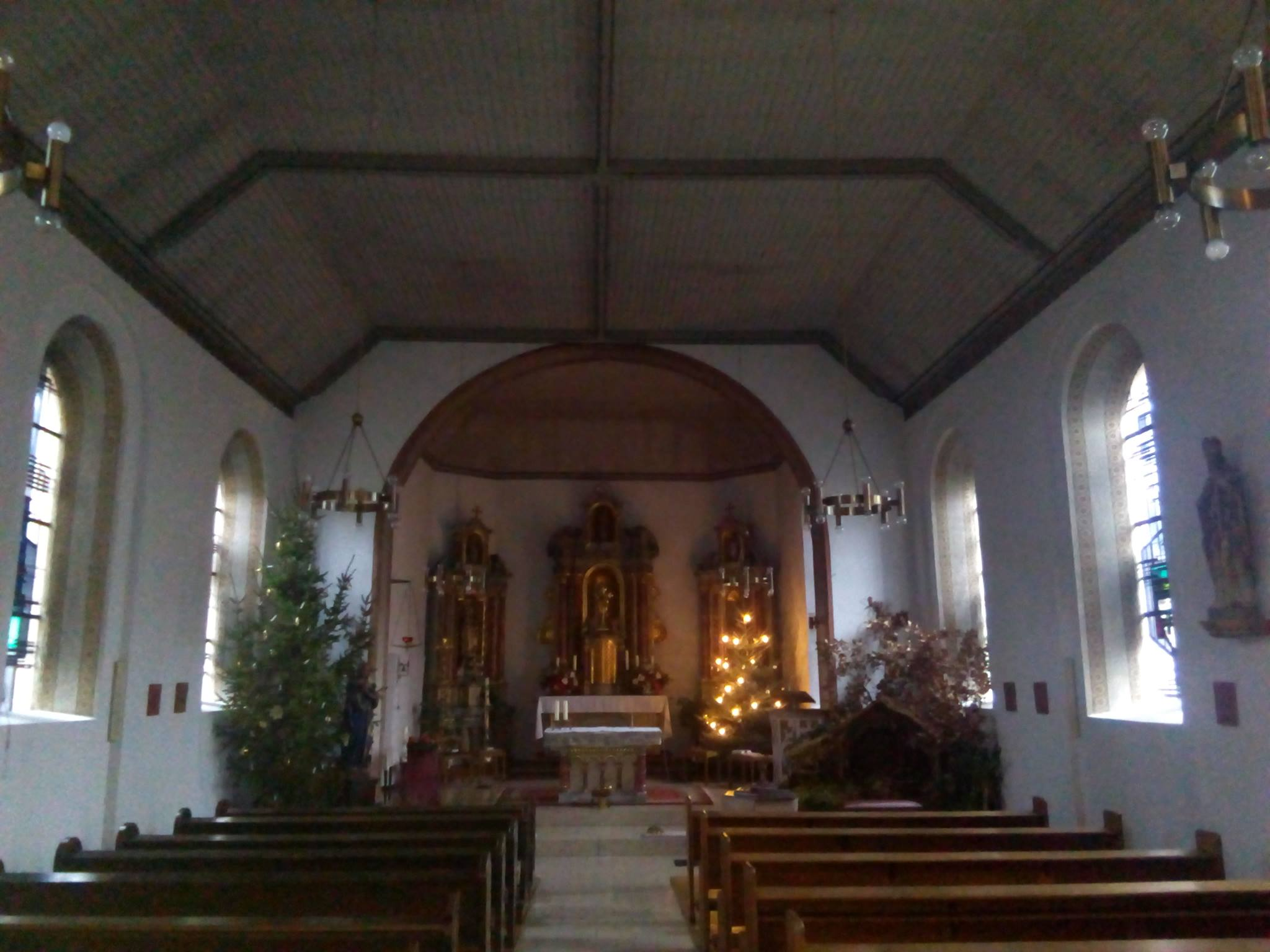 Blick auf den Altar